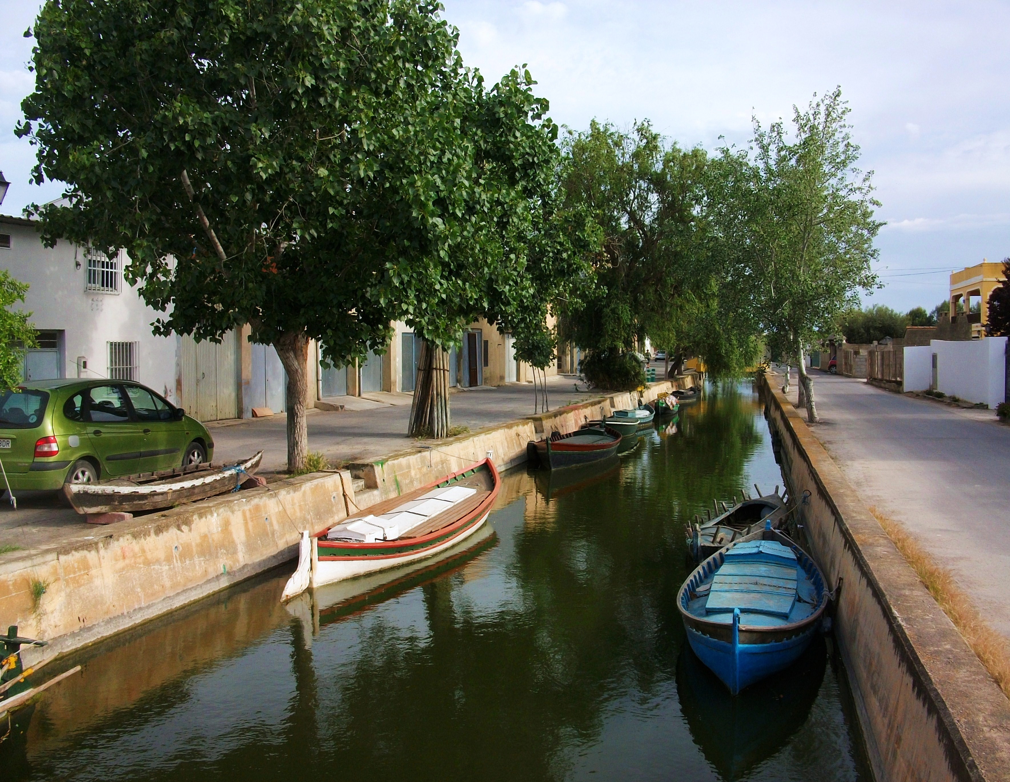 Port de Ponent - el Palmar.